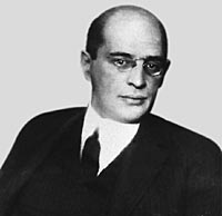 Leo Perutz (1882 - 1957), Rakouský židovský spisovatel a dramatik.